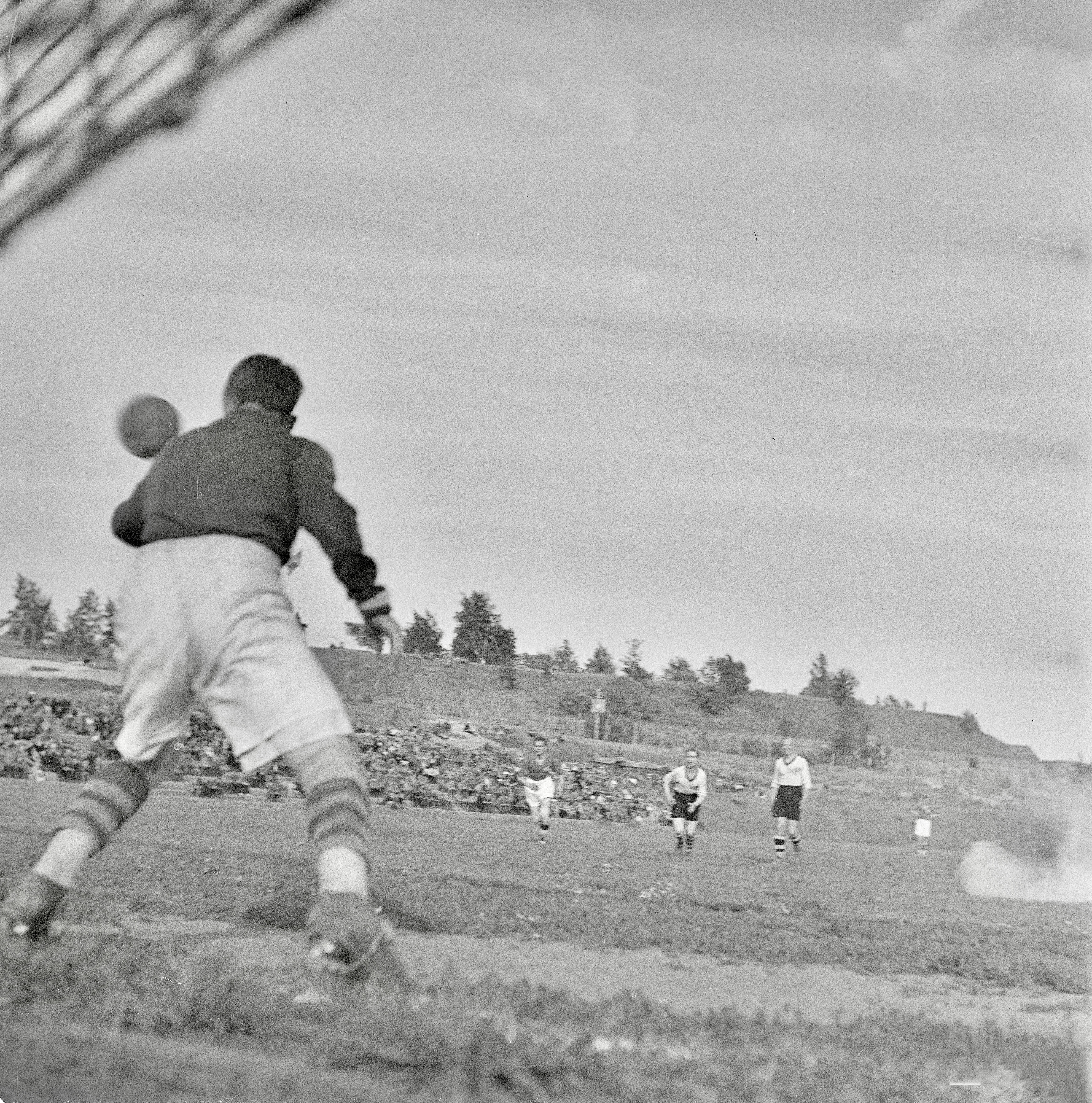 Jalkapallo-ottelu Viipuri - Helsinki Viipurin Keskuskentällä 5.7.1942. Kuva Helsingin maalilta.Viipuri voitti ottelun